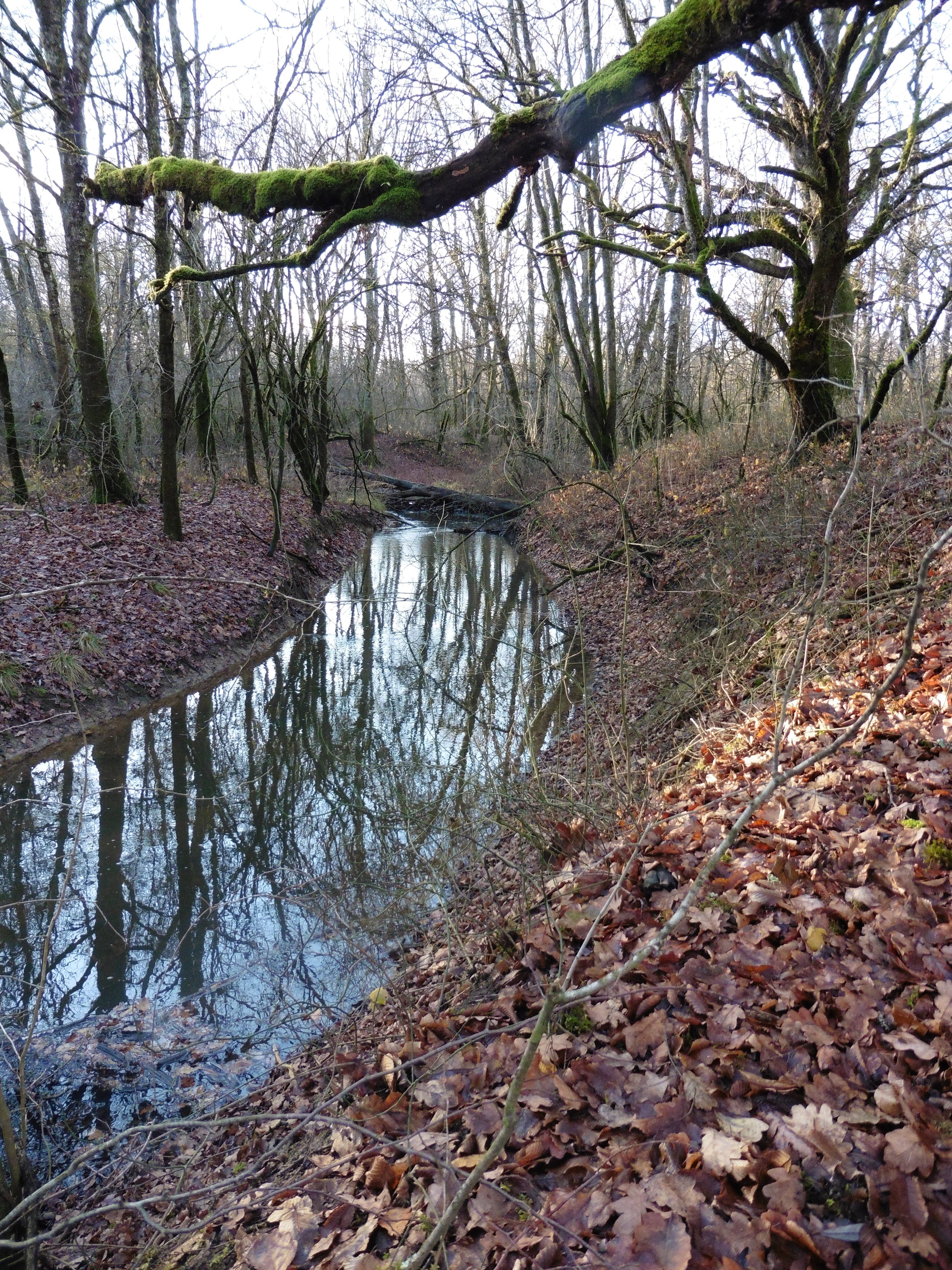 Ruisseau